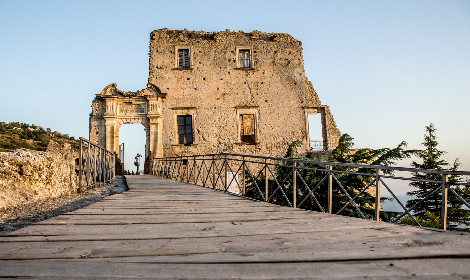 Castello della Valle This is a photo of a monument which is part of cultural heritage of Italy.